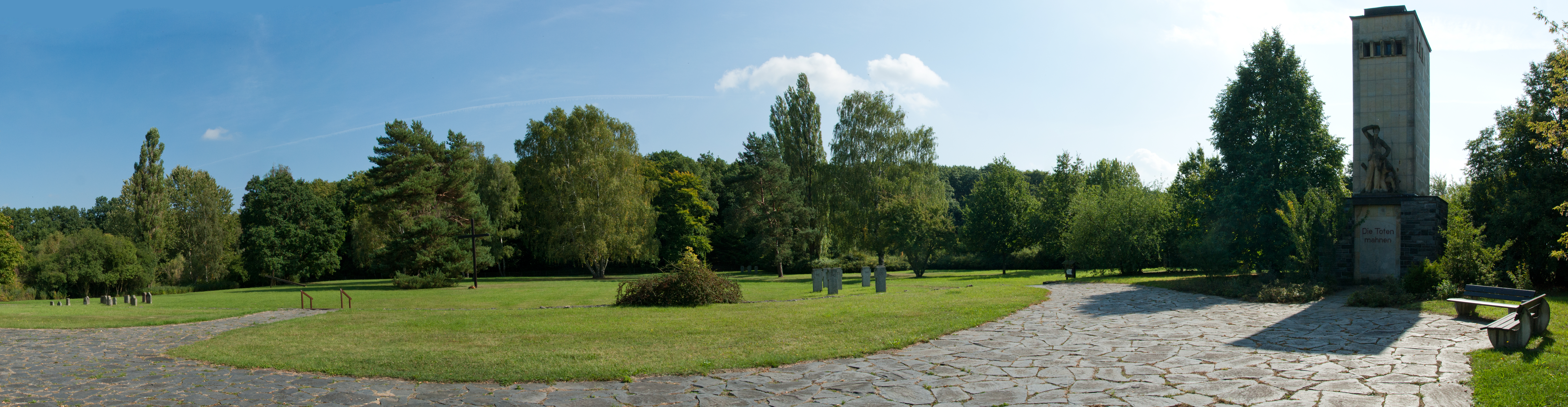 Gedenkstätte mit Denkmal und Friedhof I, Neubrandenburg, Fünfeichen, Denkmalnummer 120